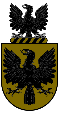 Armas da Família Azevedo